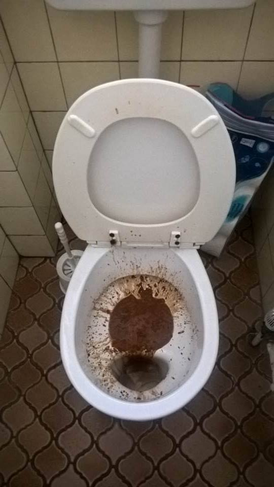 Exemple de selles anormalement liquides, type diarrhée.